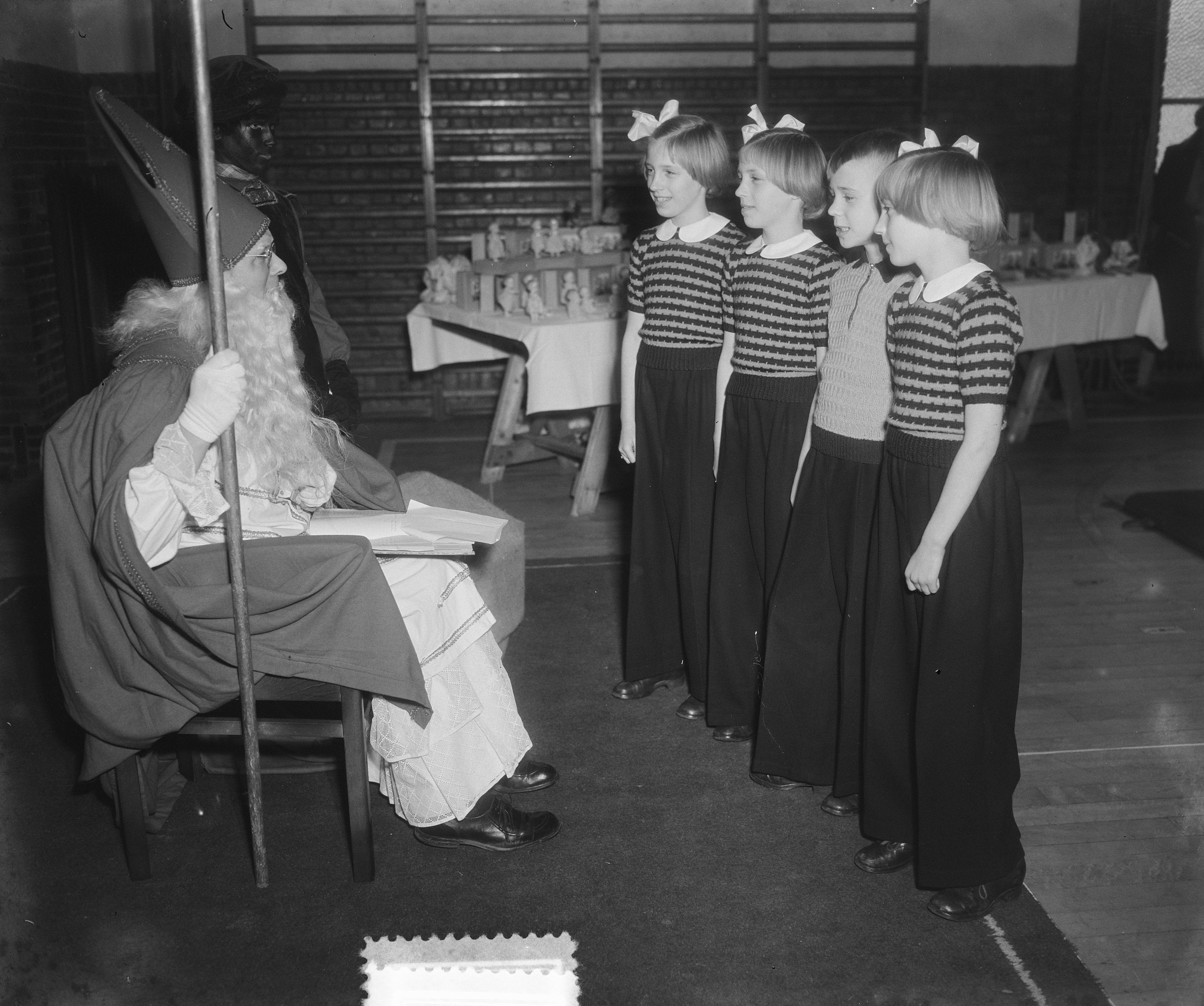 Collectie / Archief : Fotocollectie Anefo Reportage / Serie : [ onbekend ] Beschrijving : Zwolle Sint Nicolaas op school bij vierling Kliffers Datum : 5 december 1952 Locatie : Overijssel, Zwolle Trefwoorden : SCHOLEN, vierlingen Persoonsnaam : Kliffers, Sinterklaas Fotograaf : Pot, Harry / Anefo Auteursrechthebbende : Nationaal Archief Materiaalsoort : Glasnegatief Nummer archiefinventaris : bekijk toegang 2.24.01.09 Bestanddeelnummer : 905-4438